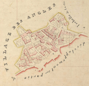 El poble dels Angles en els mapes del Cadastre napoleònic del 1812 (Arxius Departamentals dels Pirineus Orientals)